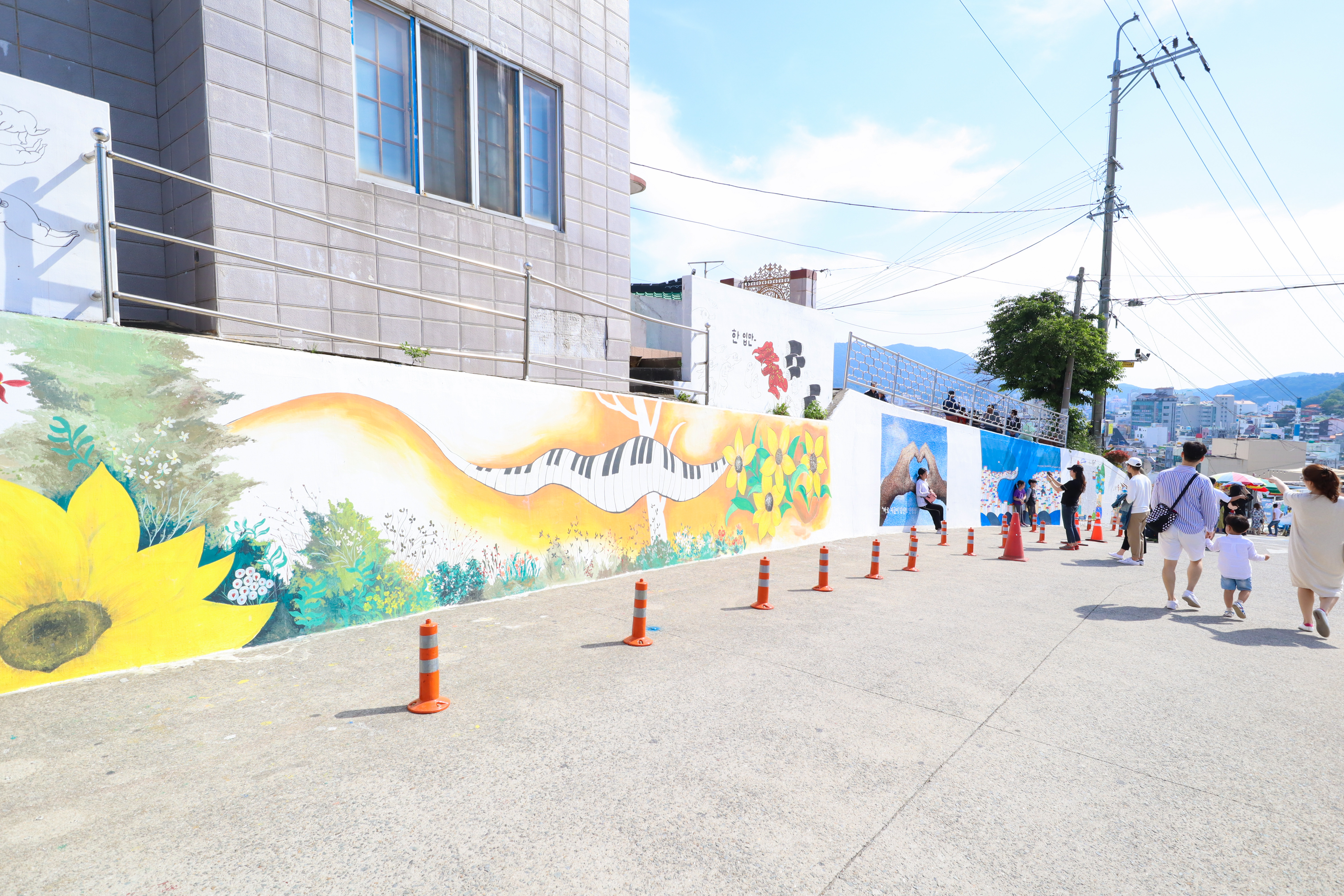 Dongpirang Village 동피랑 벽화 마을